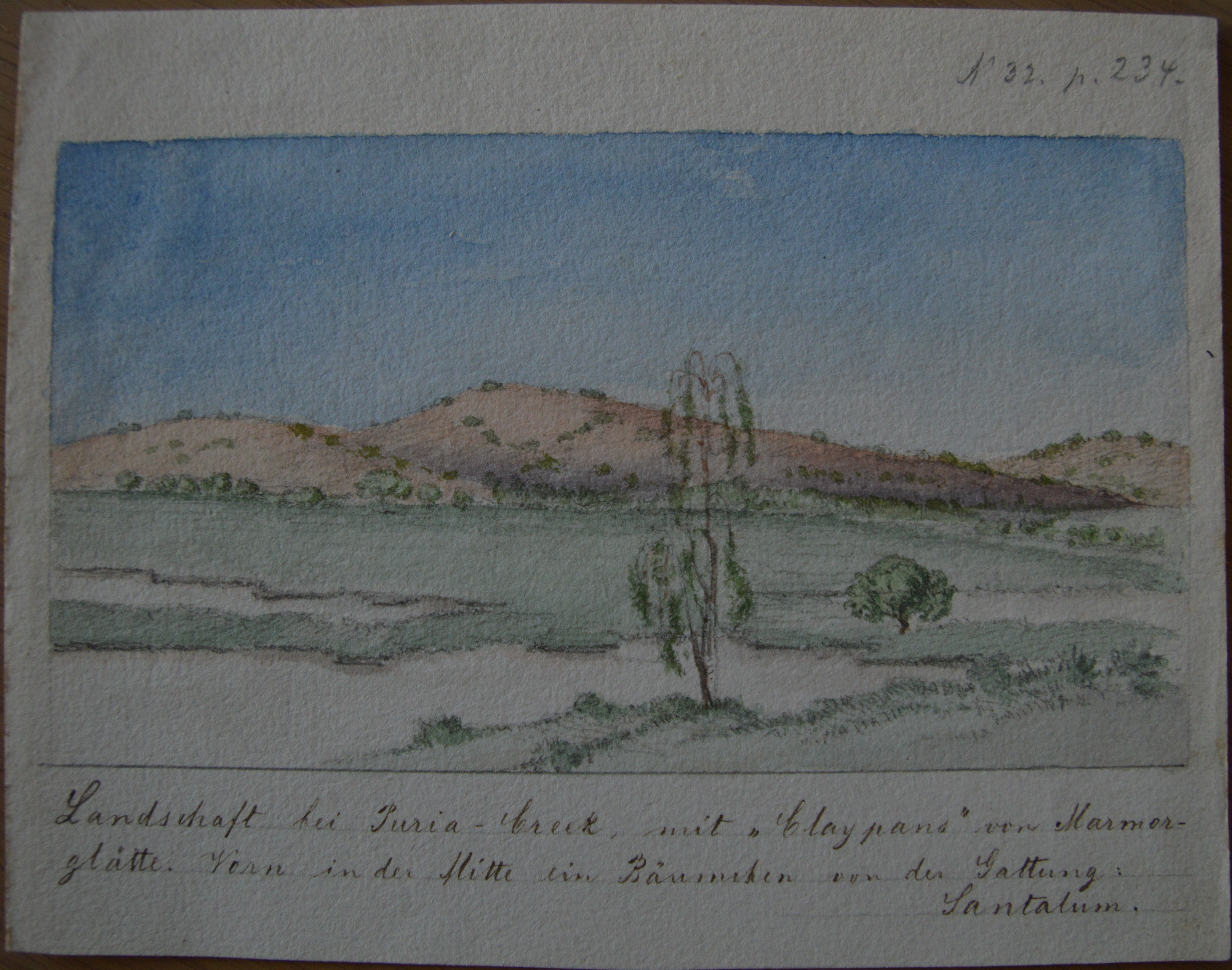 Landschaftszeichnung vom Outback Australiens (New South Wales), während der Burke and Willis Expedition. Original im Archiv des Höchstädter Rathauses, fotografiert von Thomas Balbierer. Text unten auf der Zeichnung: Landschaft bei Puria-Creek, mit „Claypan“ von Marmor-glätte. Vorn in der Mitte ein Bäumchen von der Gattung Santalum